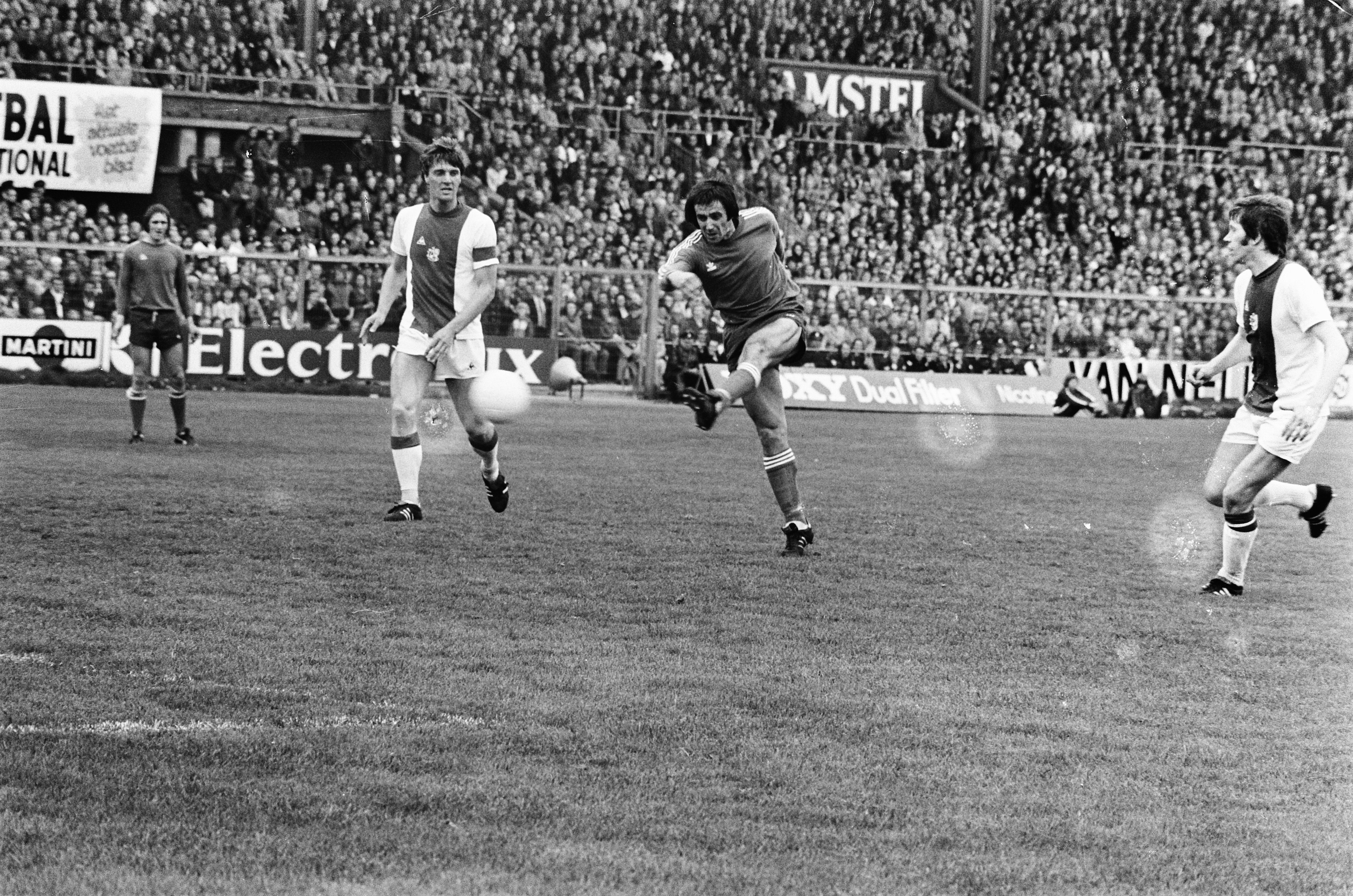 Ajax-PSV 2-4. Willy van der Kuijlen (PSV) scoort 0-3. Datum 27 april 1975